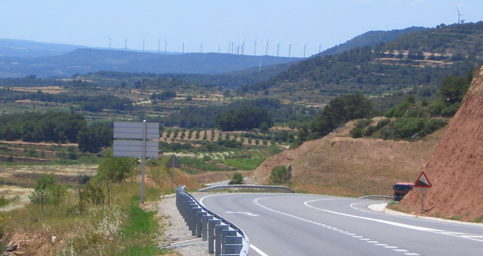 Picture of Serra del Tallat, Catalonia, Europe